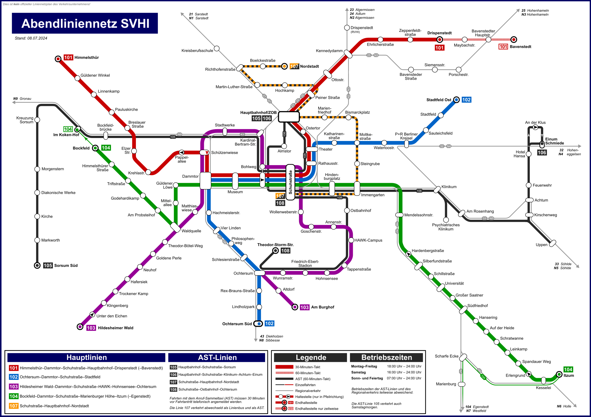 Abendliniennetz Stadtverkehr Hildesheim